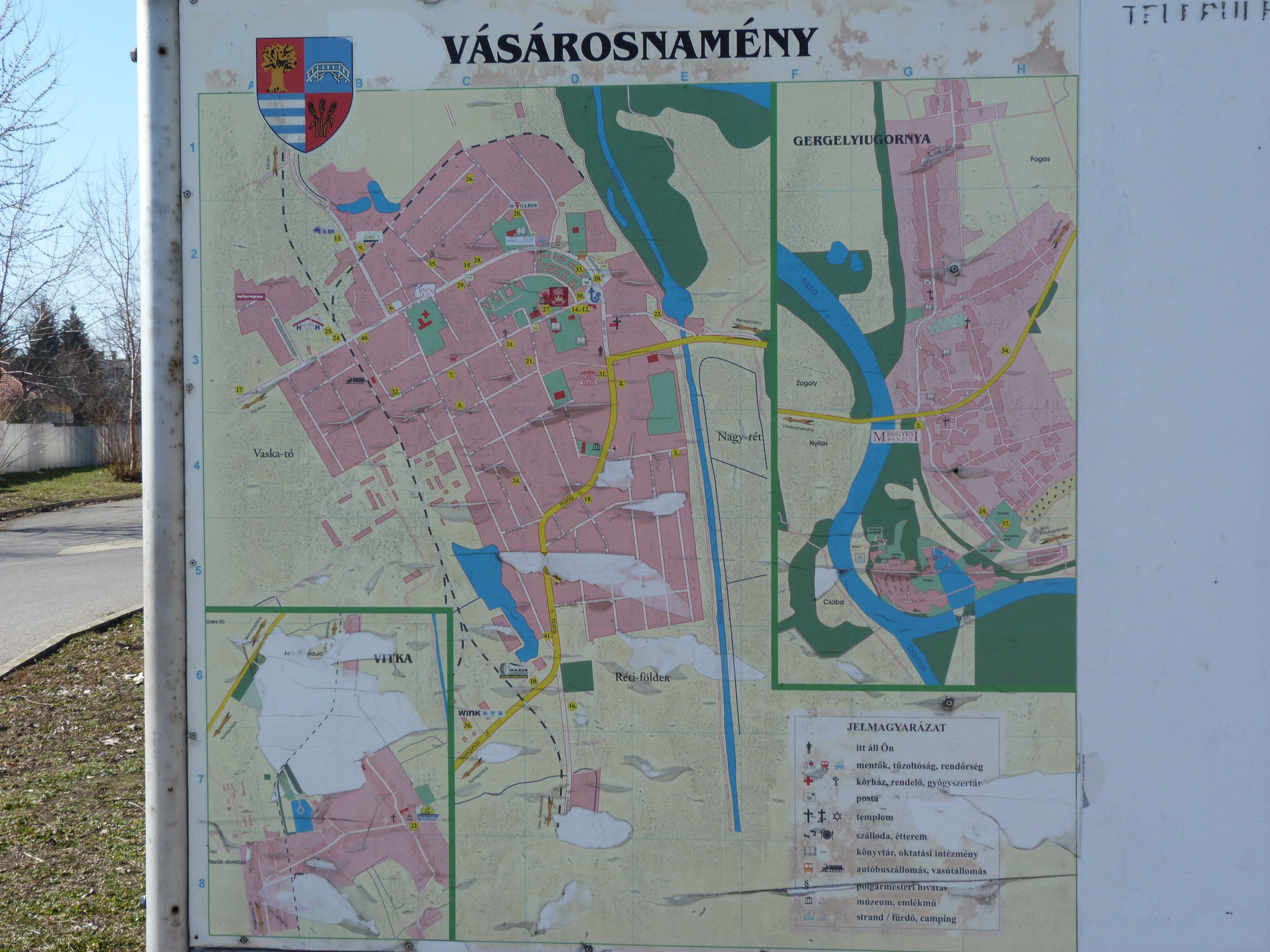 A felvételek 2013. Február 5 –én készültek Vásárosnaményben. Tamási Áron emléklap, Művelődési Ház, Balázs József emléklapja, Malenkíj robotra elhurcoltak emlékműve, Kraszna. Tomcsányi kastély. ©© Megjelent Creative Commons alatt a Metapolisz sorozatban. A Metapolisz sorozat valamennyi képe és filmje Creative Commons alatti valamint kereskedelmi - for profit - célra is felhasználható. Ajánlott hivatkozás: Derzsi Elekes Andor: Metapolisz DVD line ©© Published under Creative Commons in the Metapolisz DVD line. All of the photos and vids in the Metapolisz DVD line are under Creative Commons and can be used even for commercial – for profit – purposes. Recommended Citation Derzsi Elekes Andor: Metapolisz DVD line